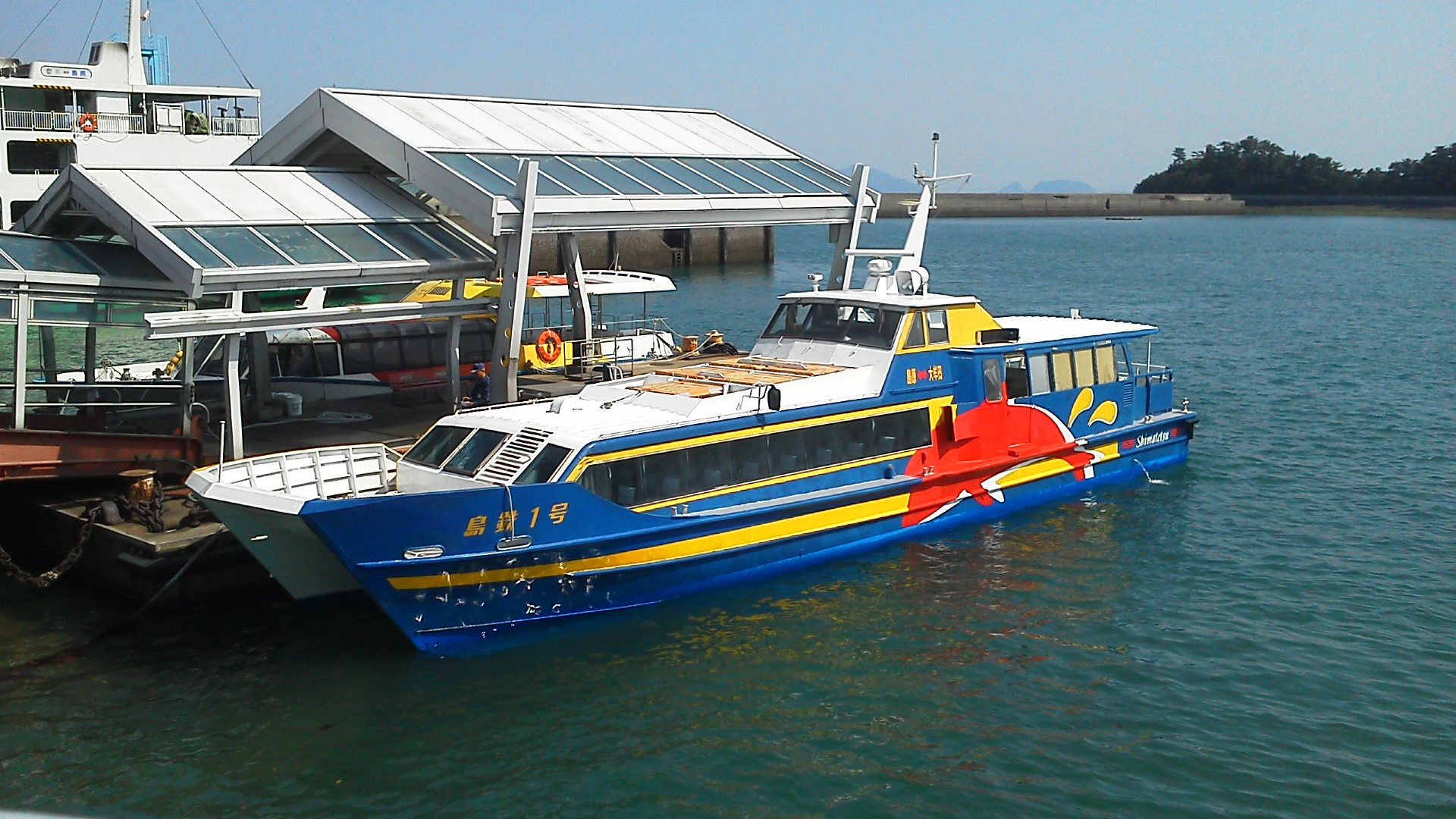 島原港に停泊する高速船（桟橋の手前が島鉄1号、奥が島鉄2号）。